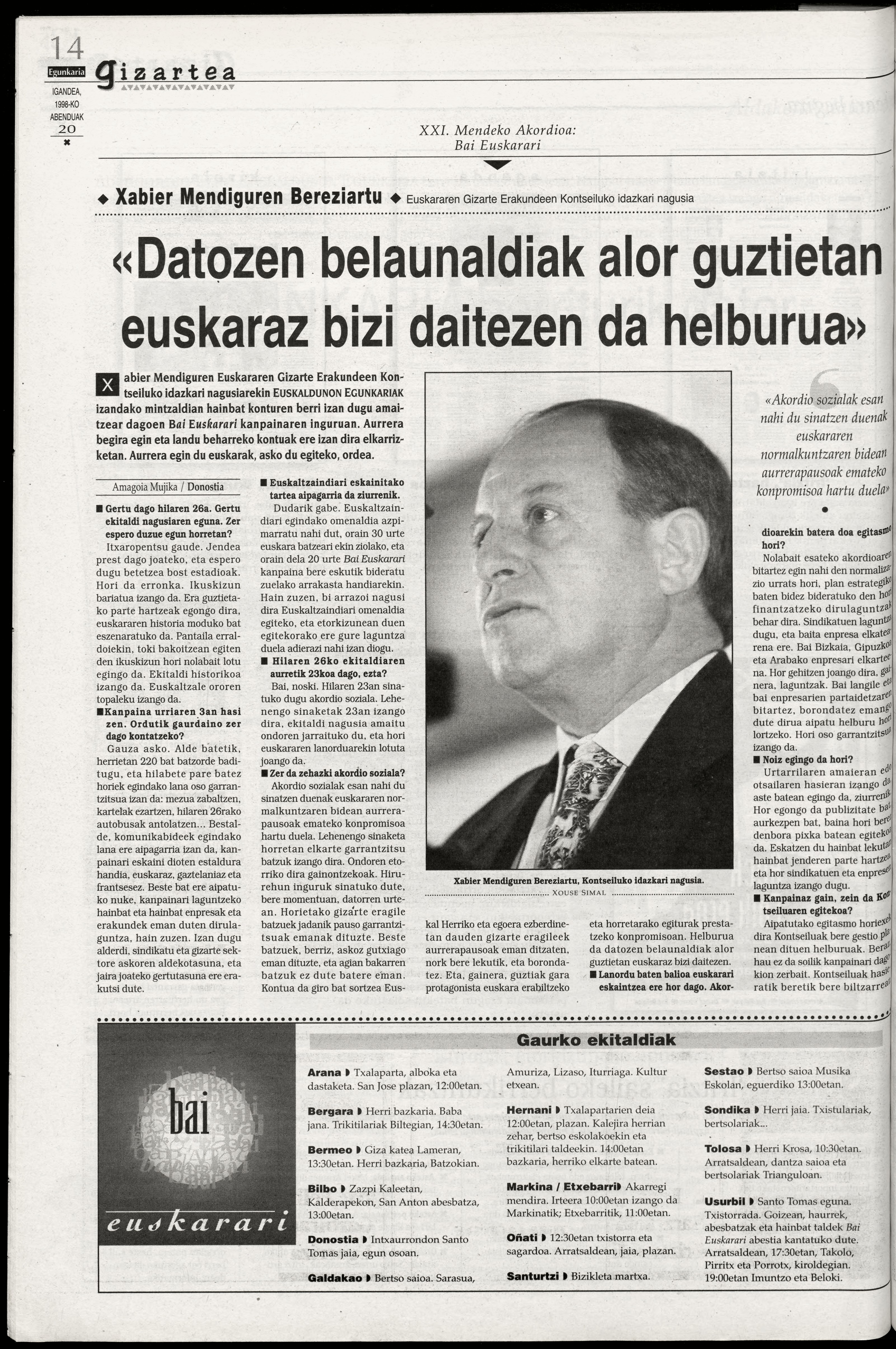 Xabier Mendiguren Bereziartu. Kontseiluko idazkari Nagusia (Egunkaria. 1998)